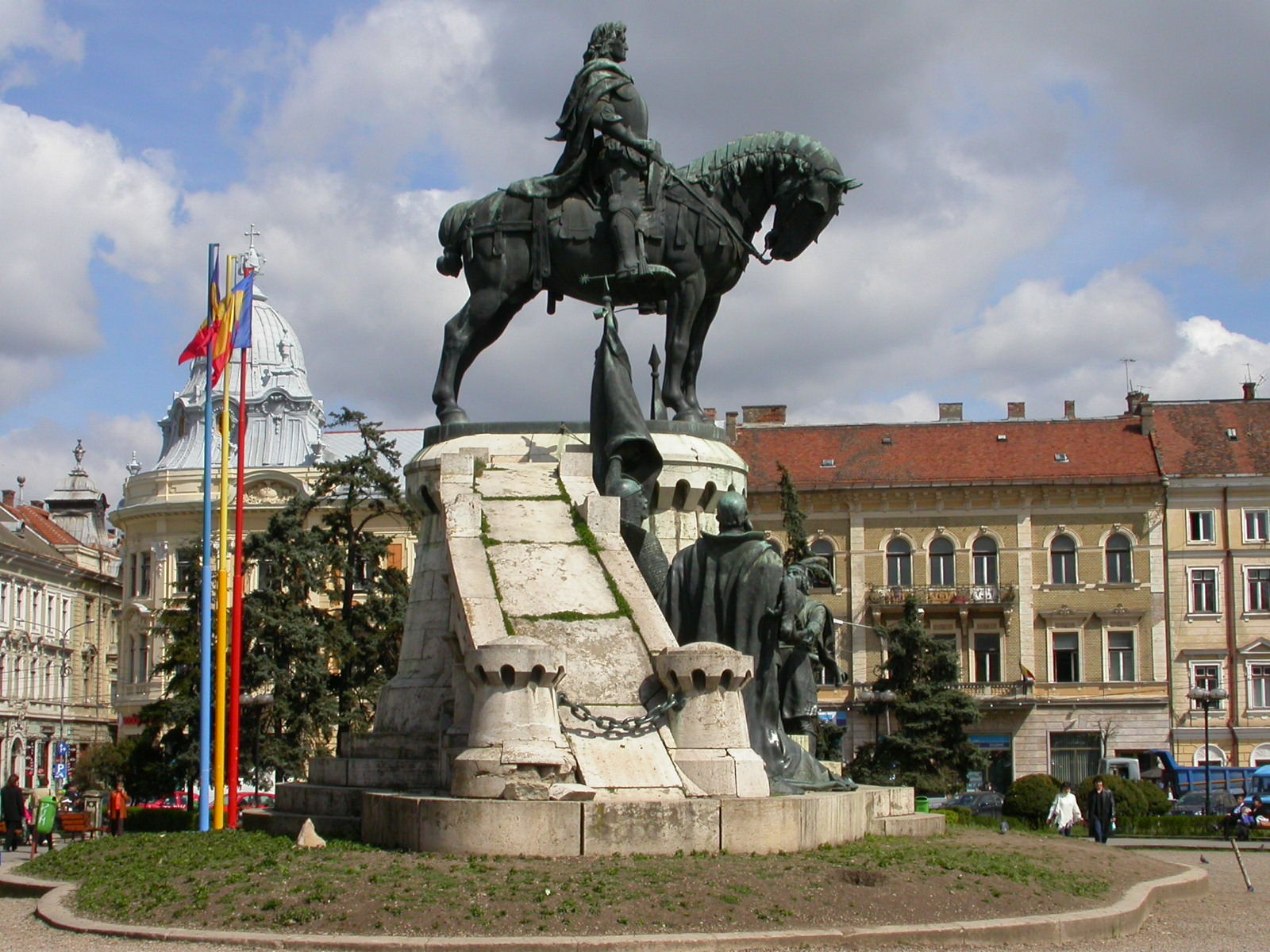 Statuia ecvestră a lui Matei Corvin, 1902